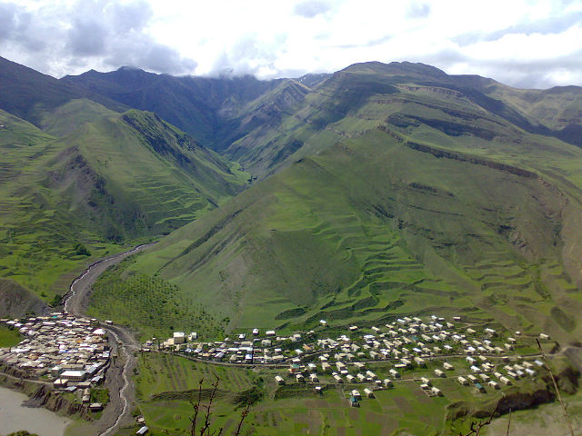 Вид сверху